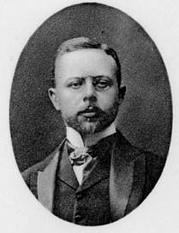 Барон Михаил Александрович Таубе